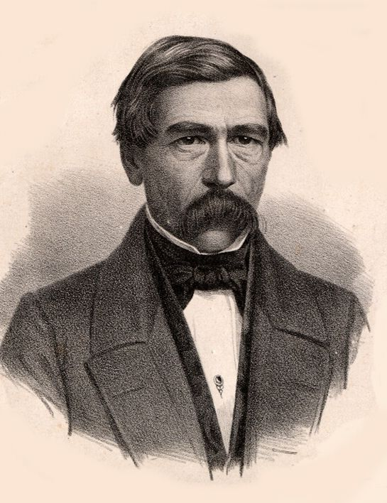 Philipp August Friedrich Mühlenpfordt ordentlicher Professor an der Königlichen Polytechnischen Schule zu Hannover von 1831 bis 1868